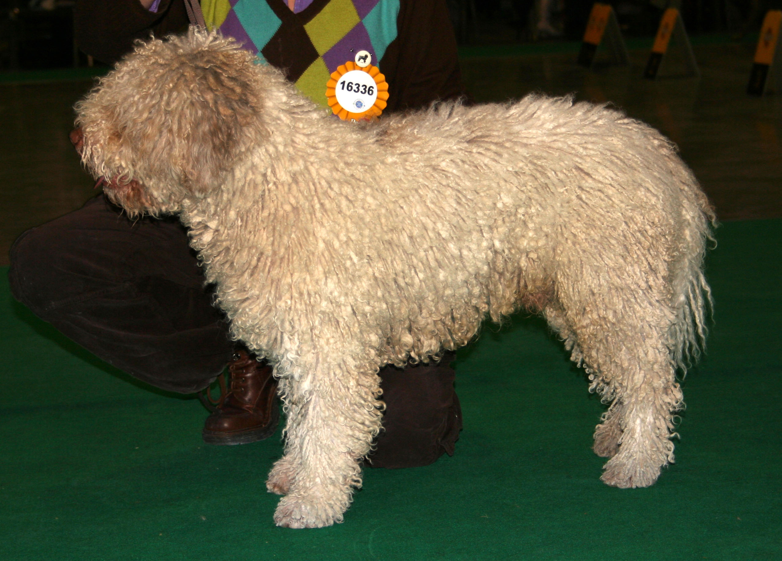 Hiszpański_pies_wodny na Światowej Wystawie Psów Rasowych w Poznaniu